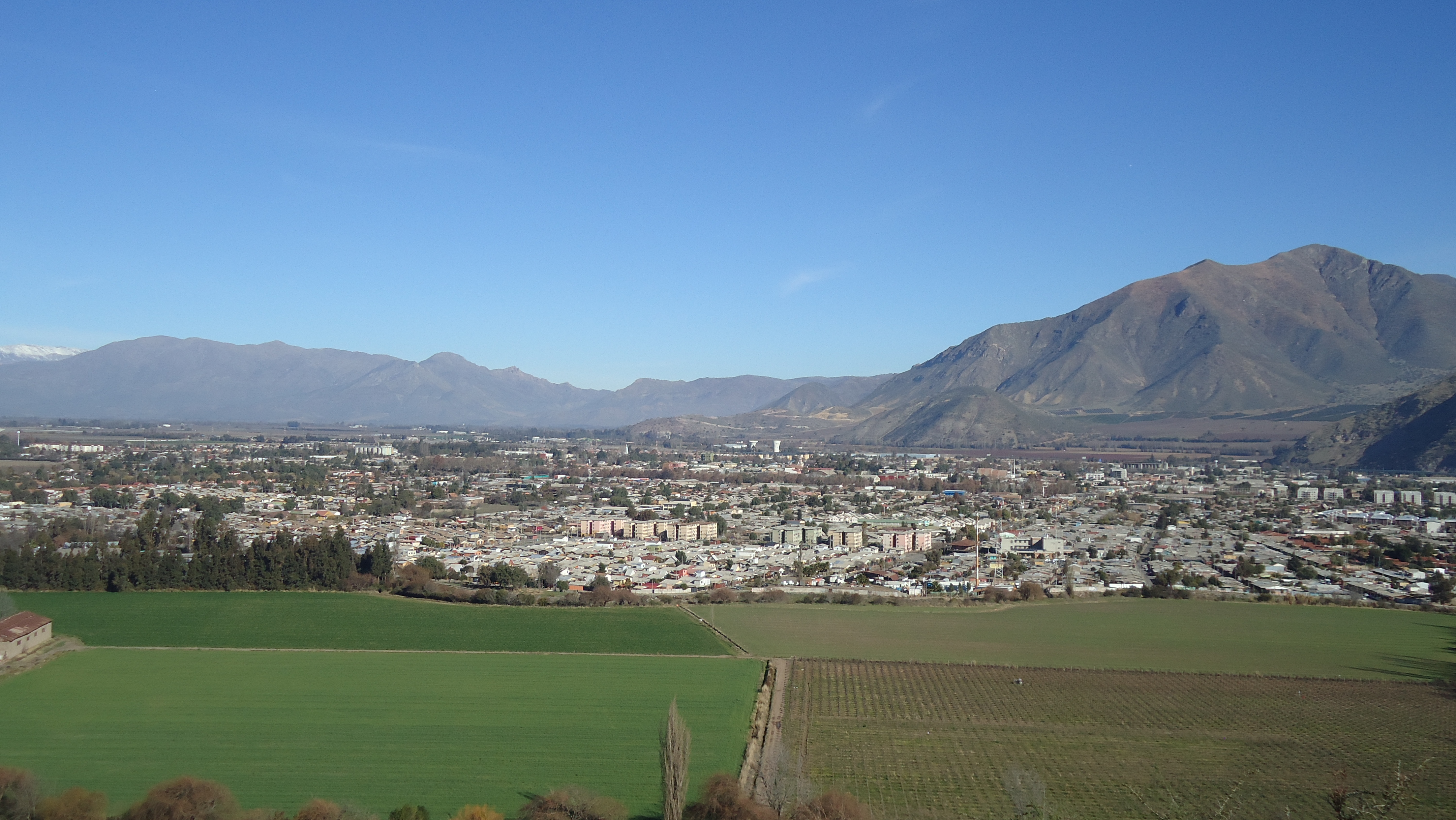 Vista de San Felipe desde el cerro la virgen año 2018